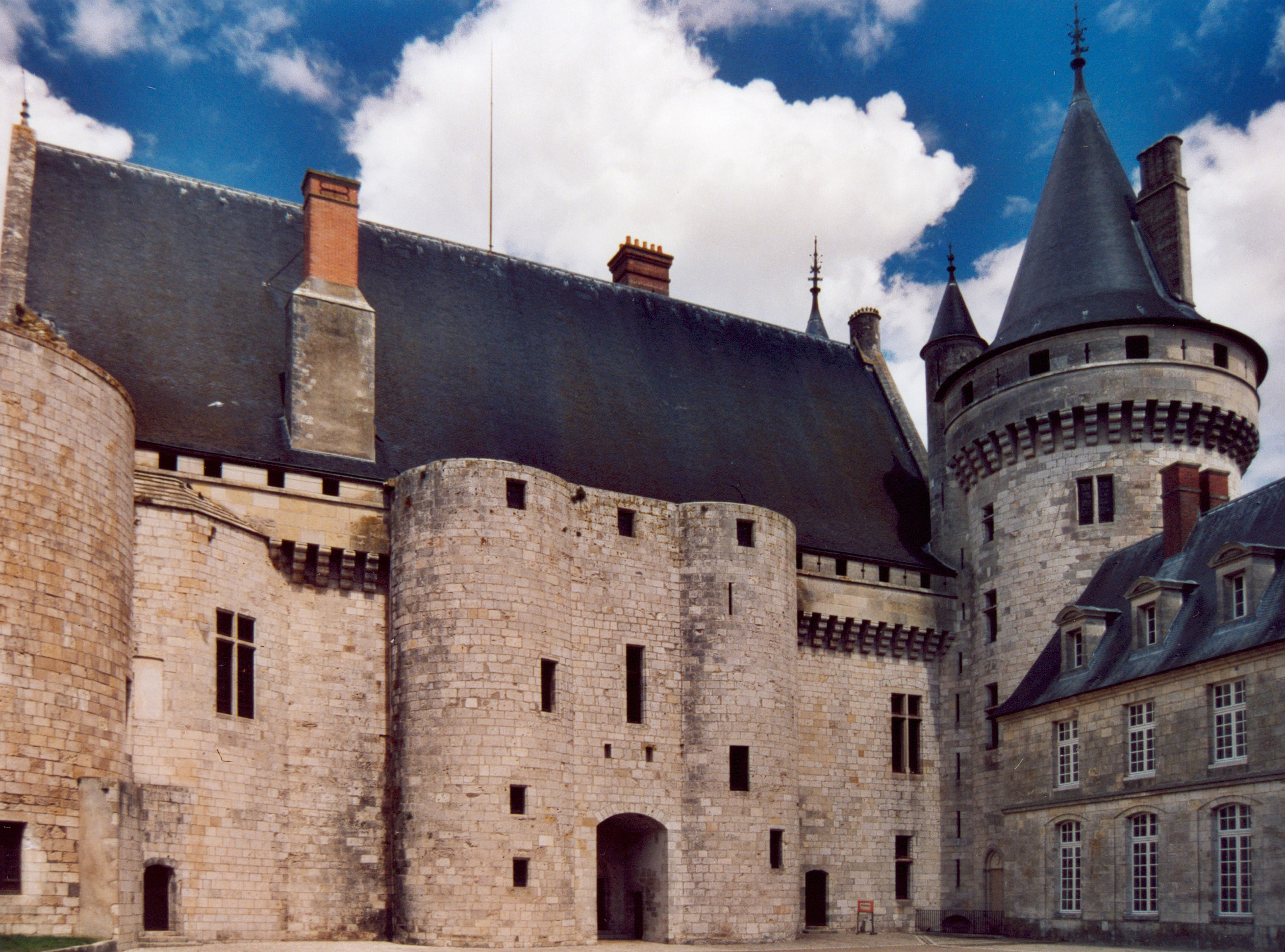 France Loiret Sully-sur-Loire Le château Photographie prise par GIRAUD Patrick